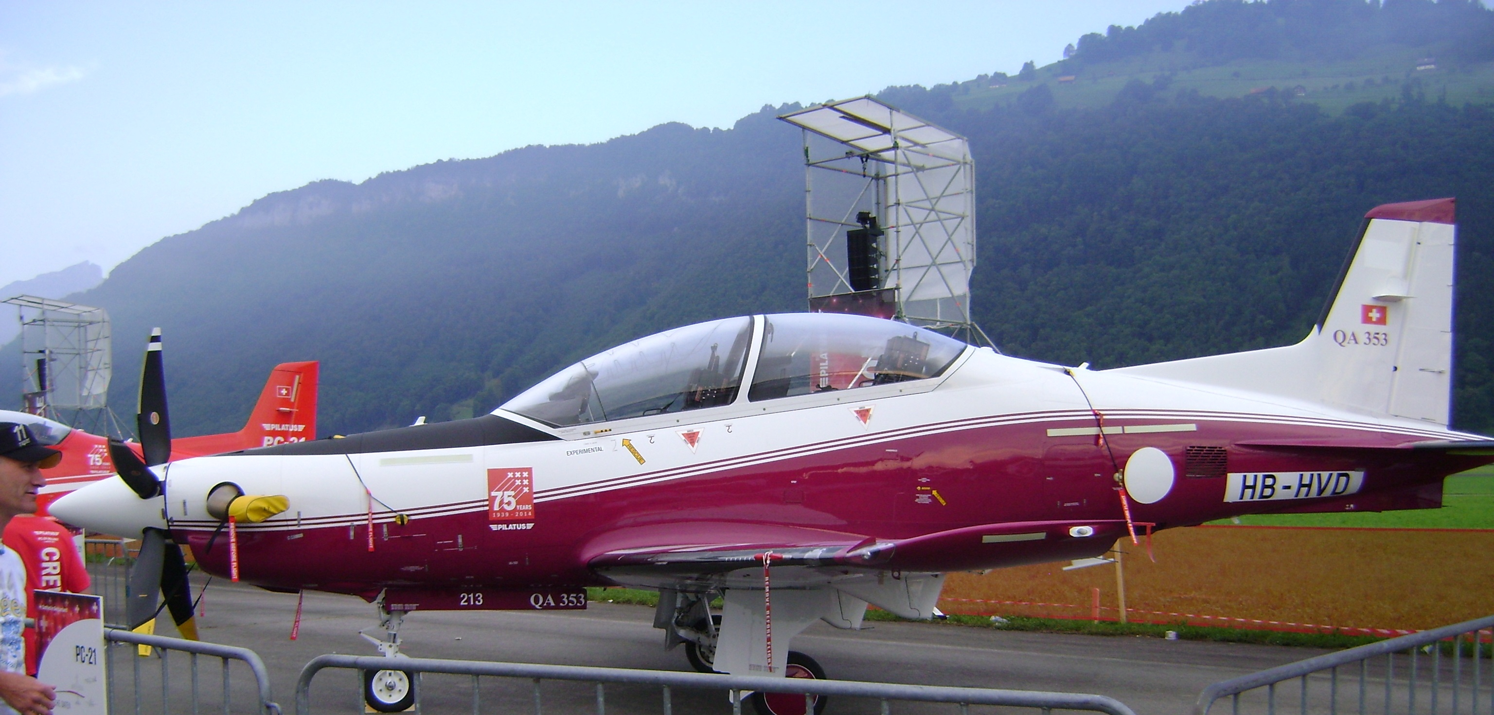 New quatar PC-21